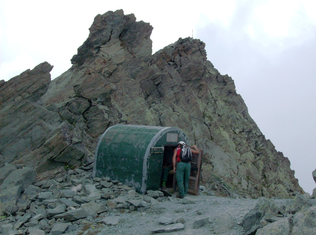 Il bivacco posto nelle vicinanze di Punta Venezia